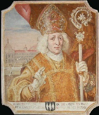 Johann Franz Eckher, Bischof von Freising